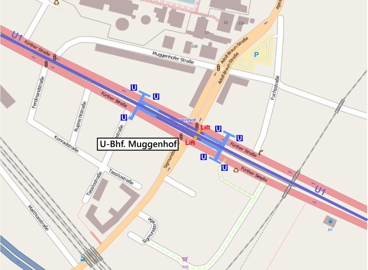 Lageplan U-Bahnhof Mugenhof